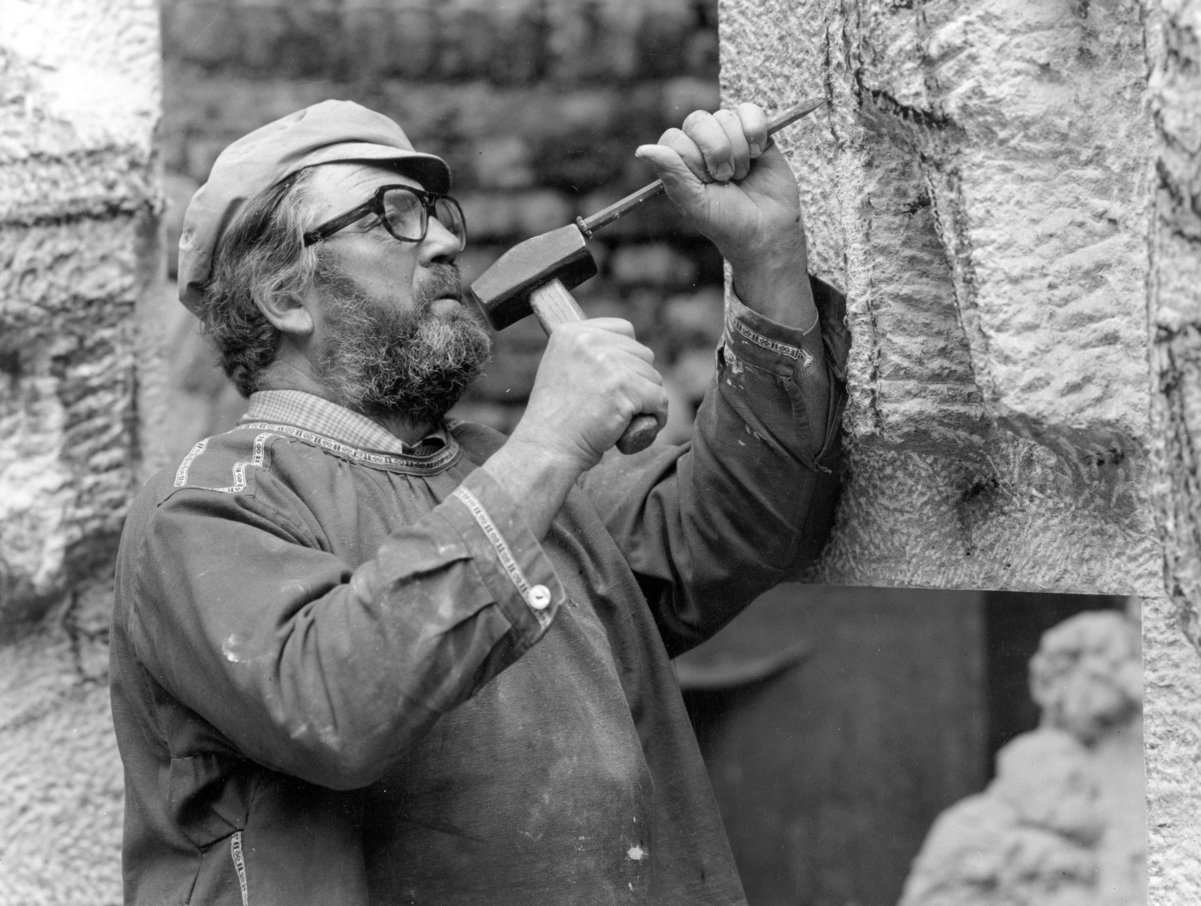 Portret van P.H. (Pieter) d' Hont, geboren Hilversum 24 april 1917, beeldhouwer te Utrecht, overleden Utrecht 12 juni 1997. Te halve lijve rechts, staande, aan het werk in zijn atelier.